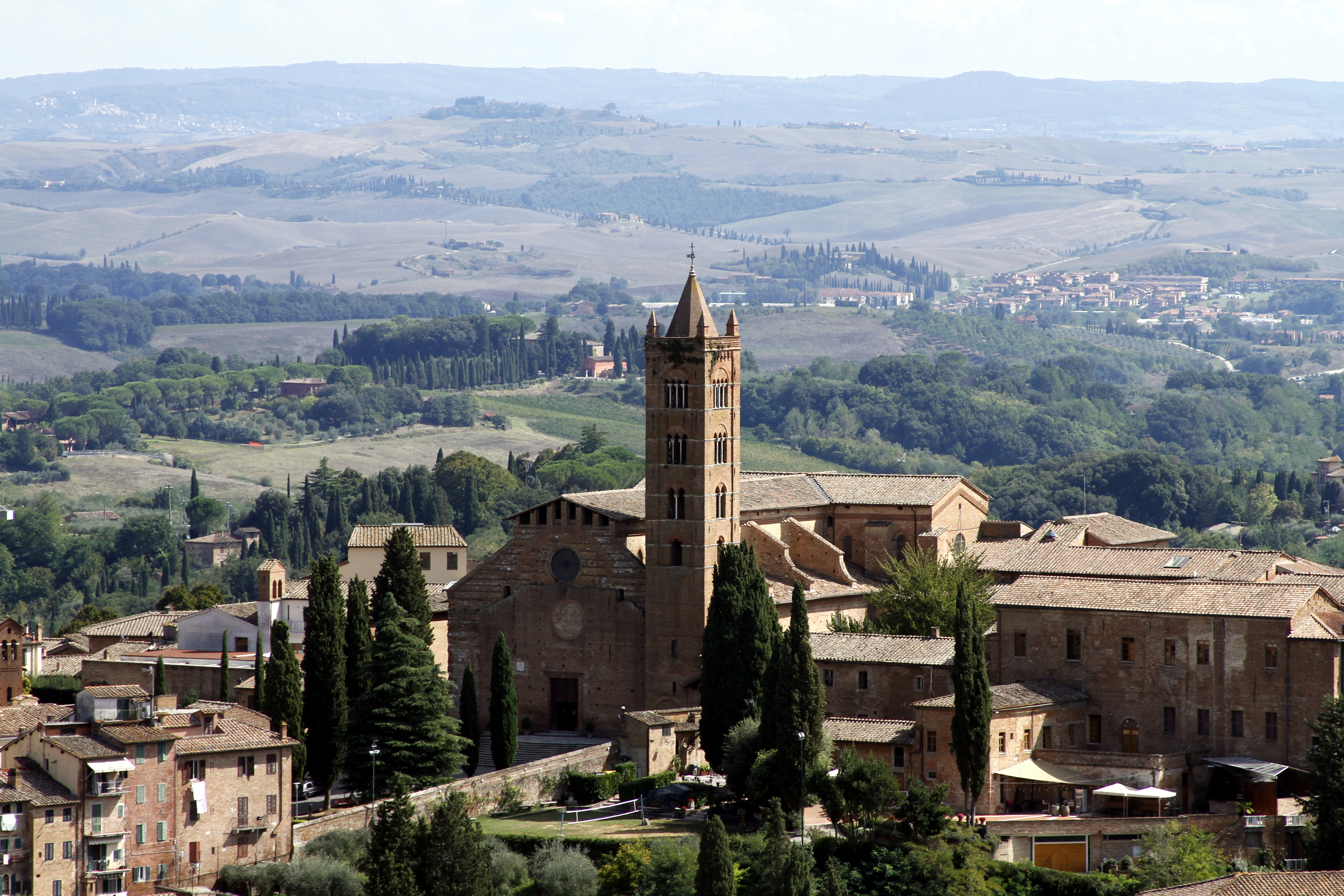 Views of Siena from Facciatone